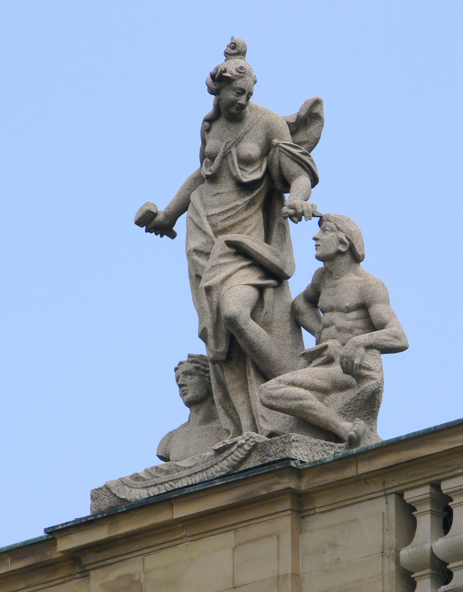 Stuttgart, Neues Schloss, Allegorie der Bildhauerei von Domenico Ferretti